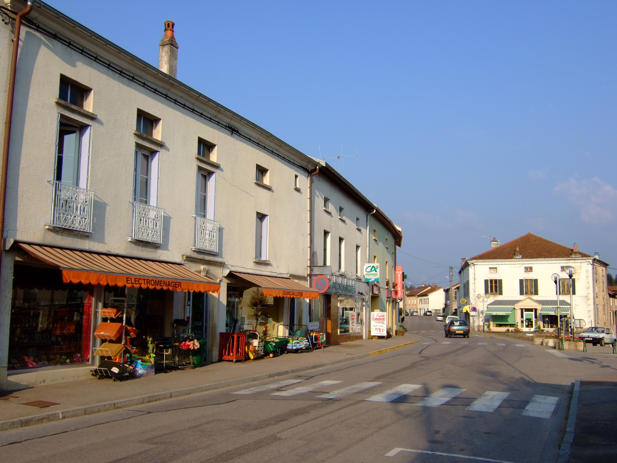 Le centre de Monthureux-sur-Saône